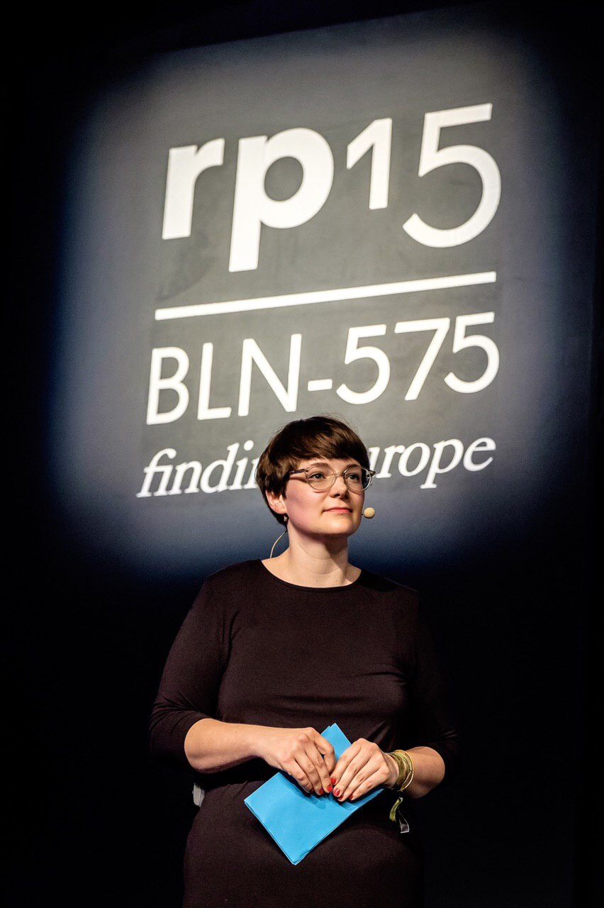 Mareice Kaiser als Speakerin auf der re:publica 2015 in Berlin